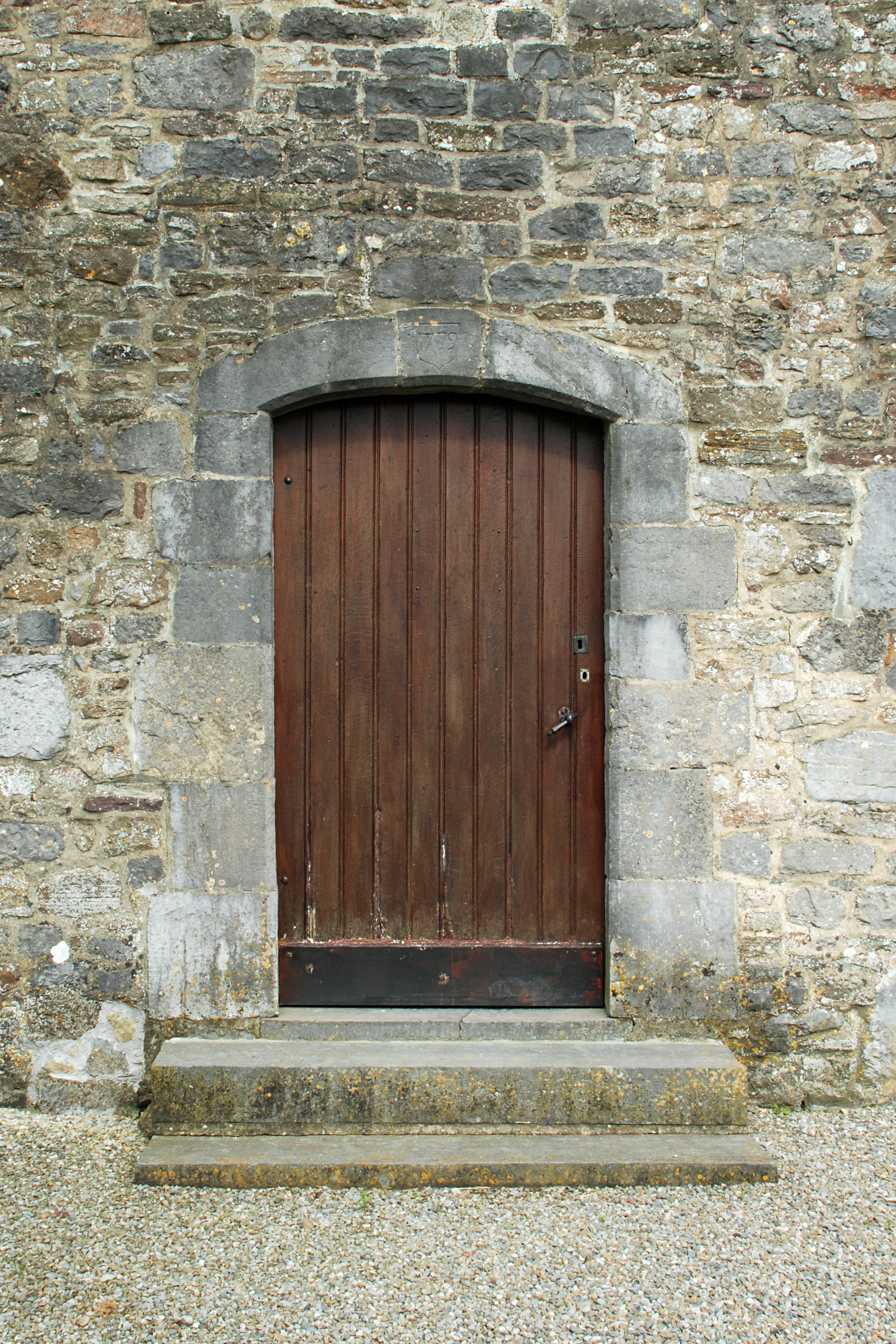 Belgique - Province de Namur - Maillen - Église Saint-Martin d'Ivoy